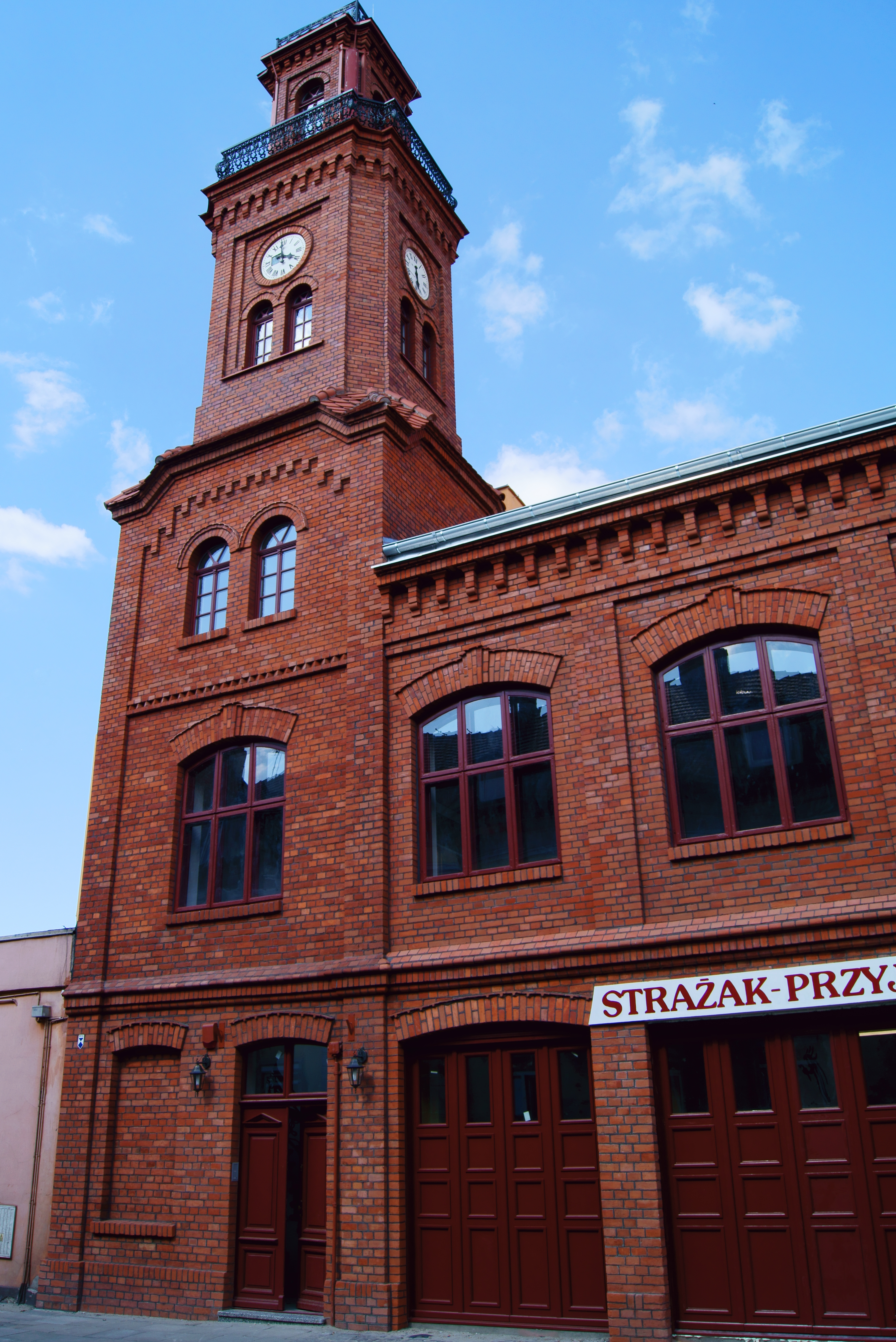 remiza straży pożarnej, ob. ekspozycja muzealna, 1909, Włocławek, ul. Żabia 8, miasto Włocławek